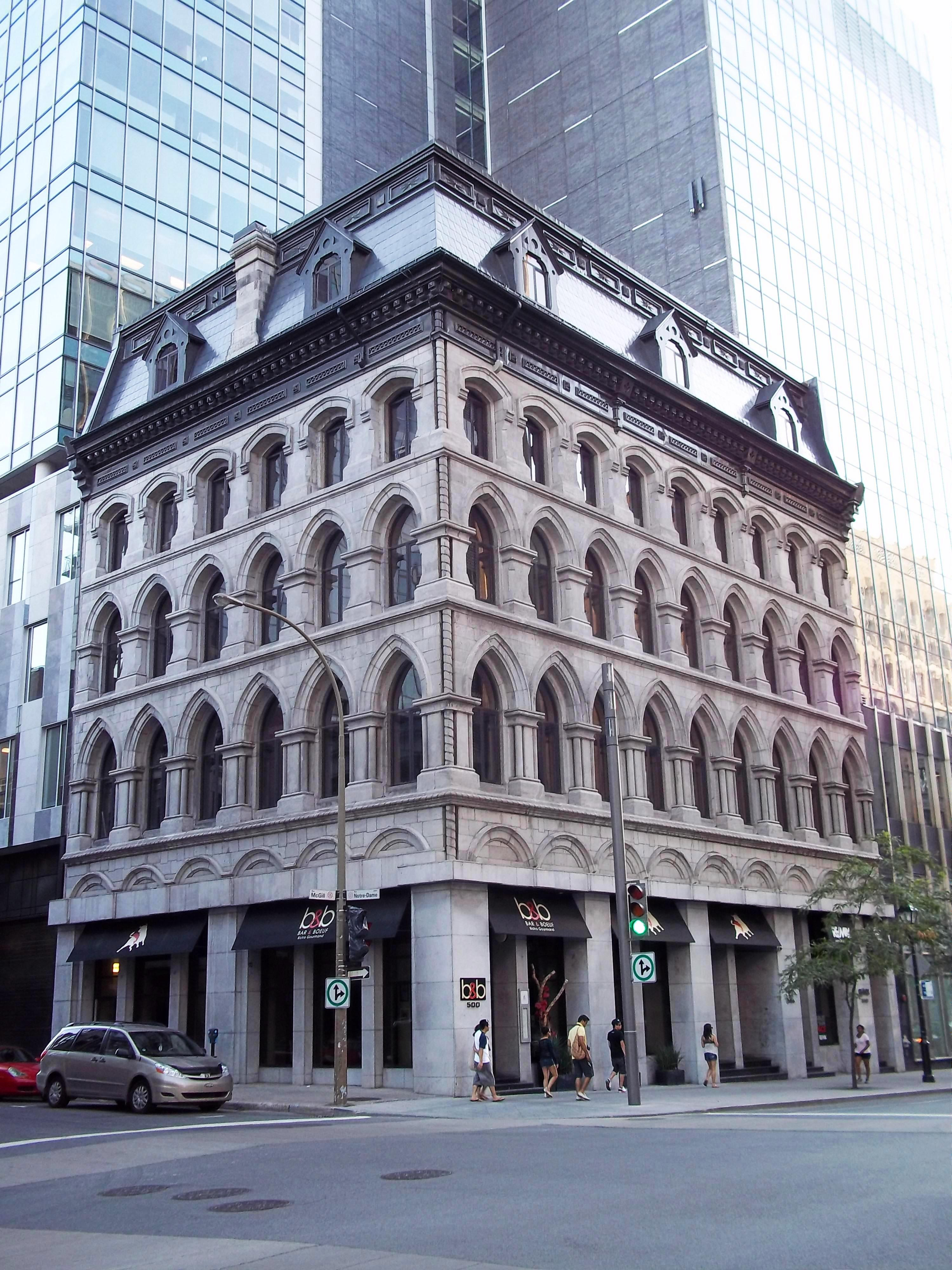 Immeuble Wilson Chambers, 500-510 rue McGill, Montréal info